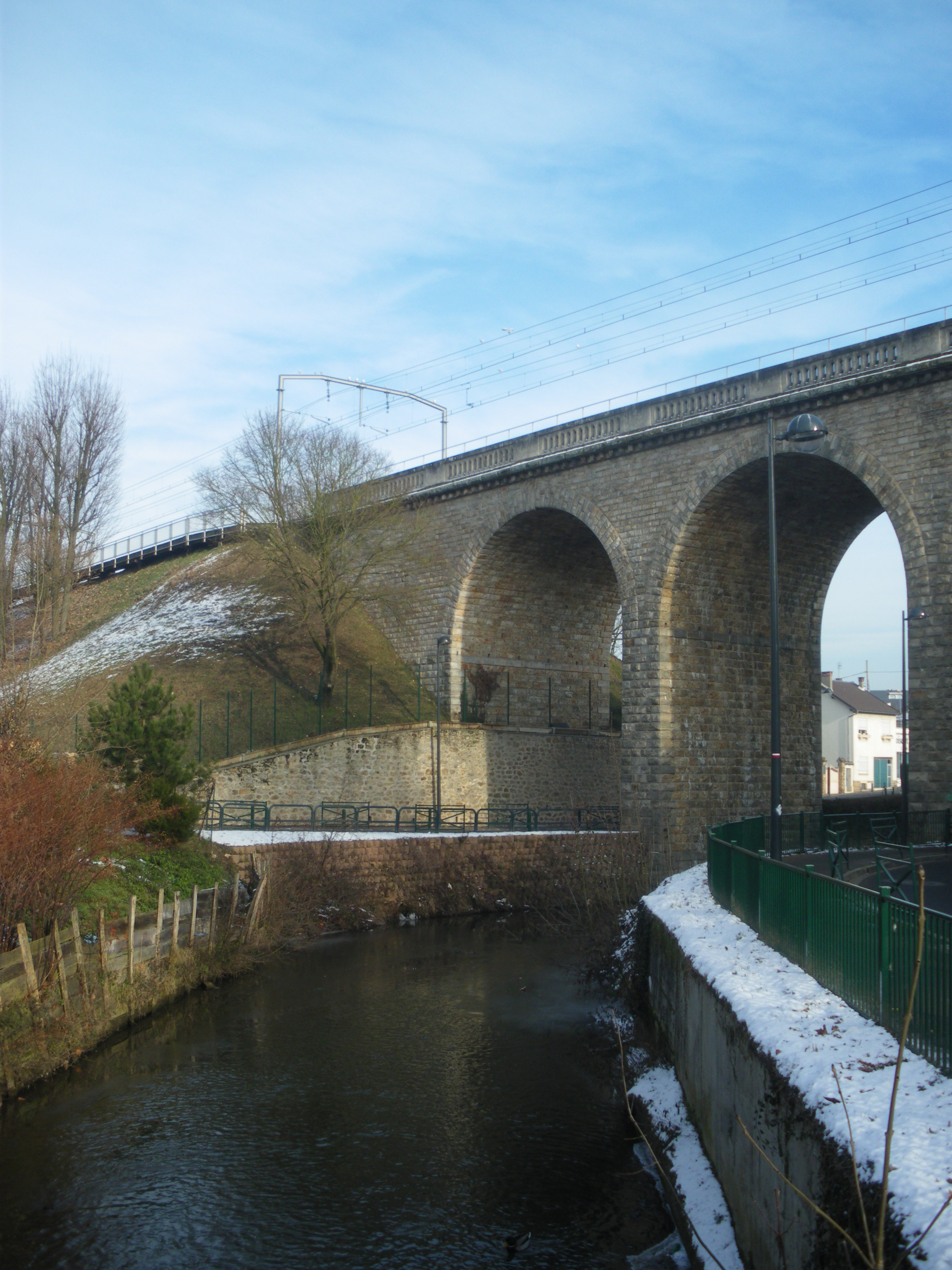 Yvette à Orsay, Essonn